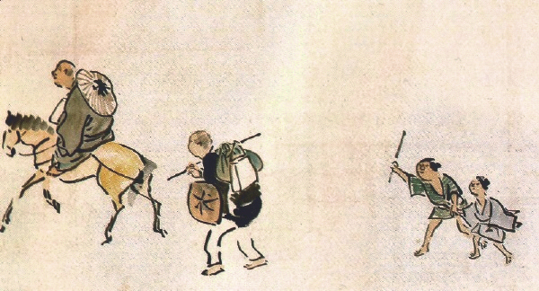 『奥の細道絵巻』那須黒羽